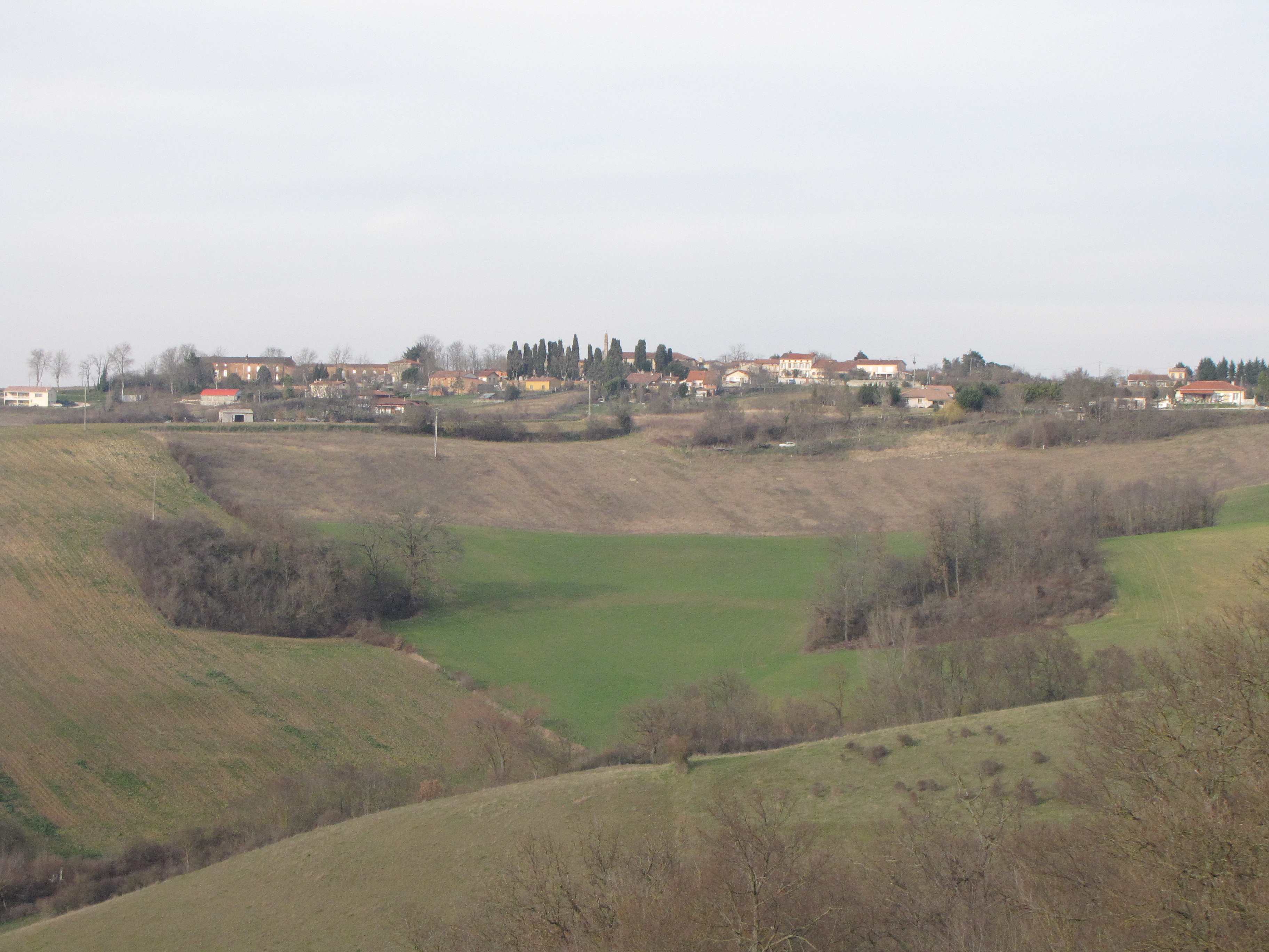 Vue d'Esperce